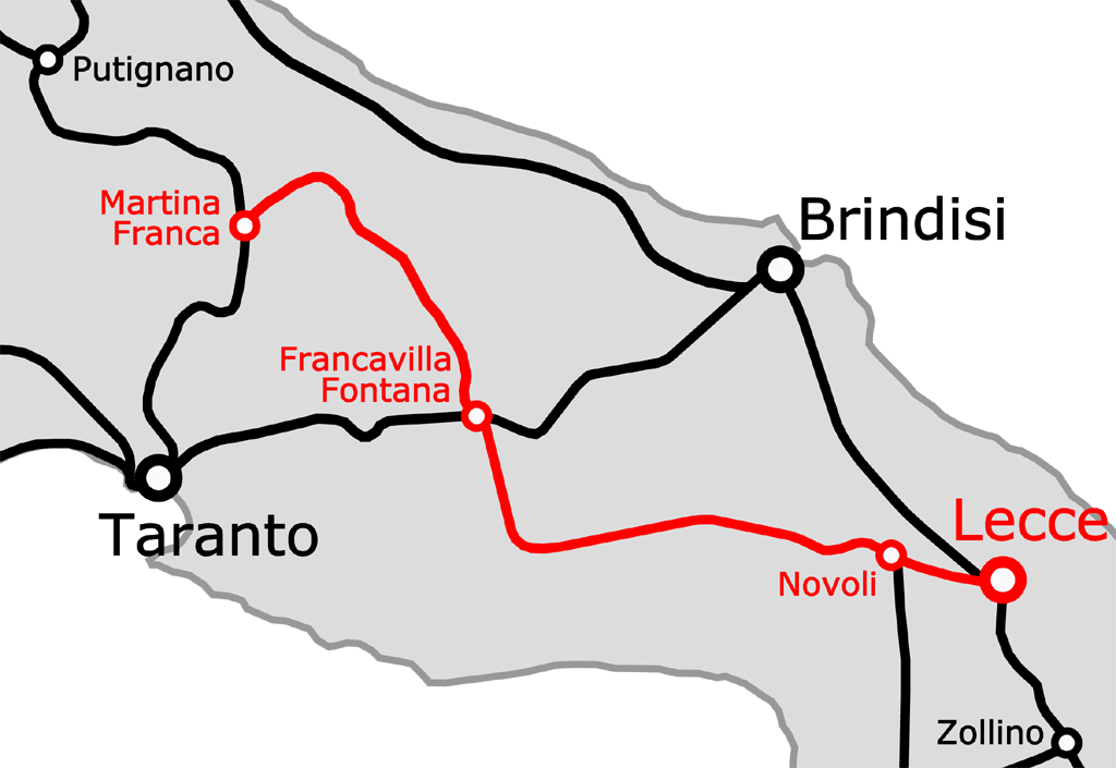 Percorso della ferrovia Martina Franca-Lecce.